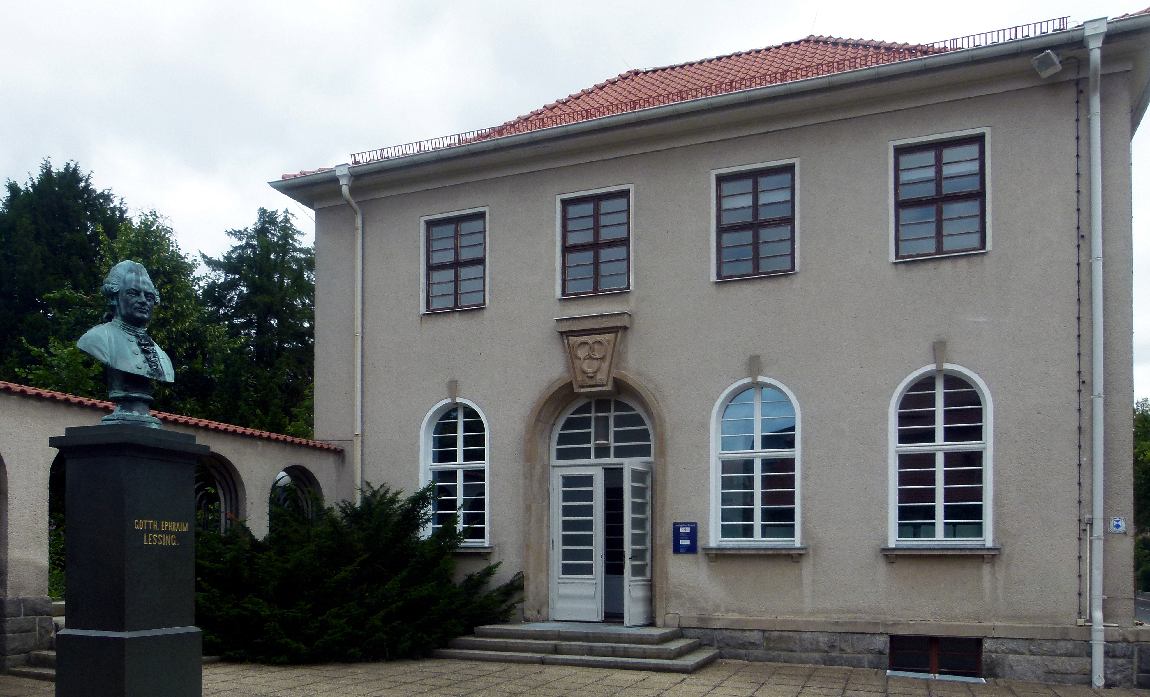 Lessinghaus in Kamenz, Sachsen